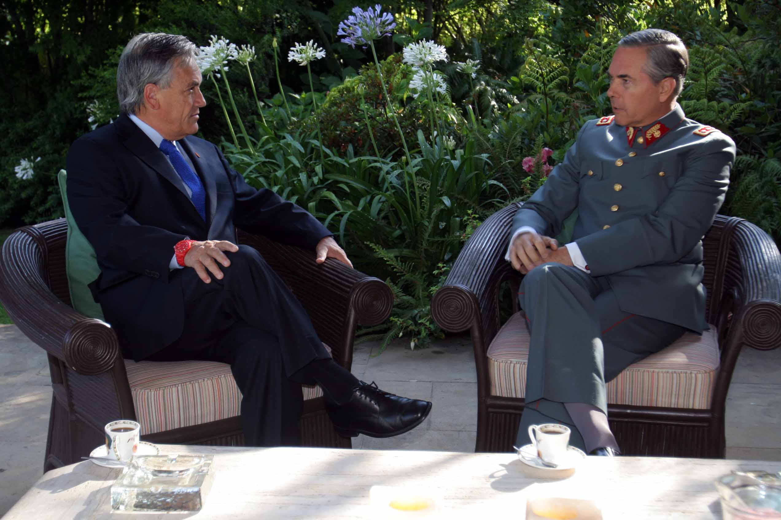 El Presidente electo de Chile Sebastián Piñera junto al Comandante en Jefe del Ejército de Chile, General Óscar Izurieta